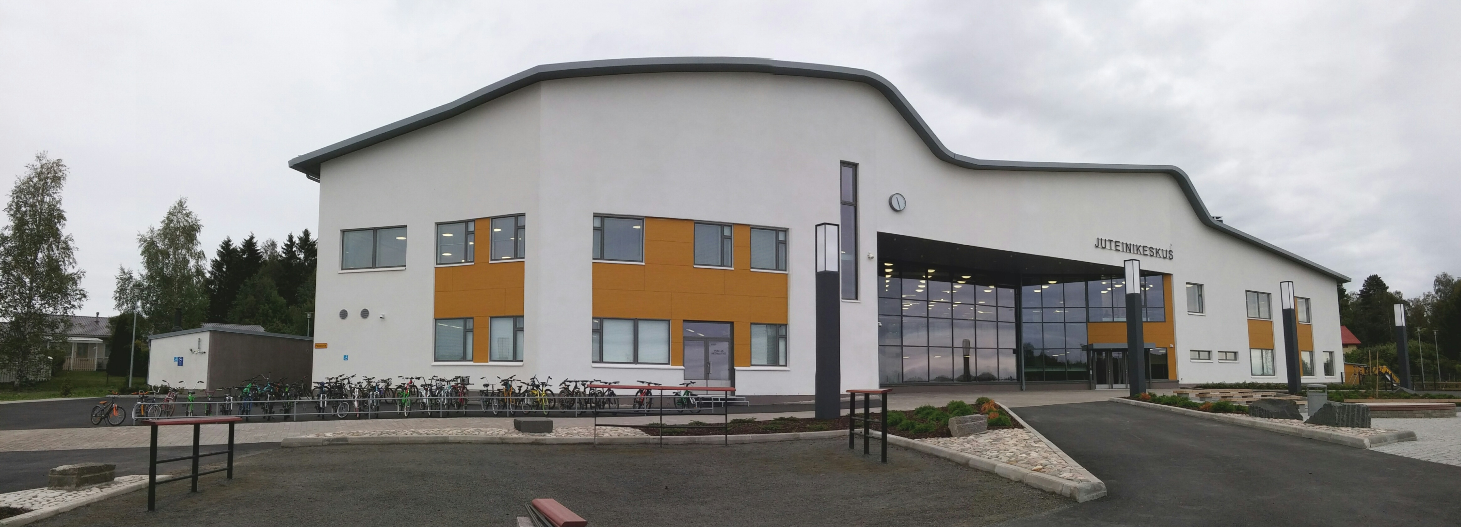 Juteinikeskus Hattulan Parolassa